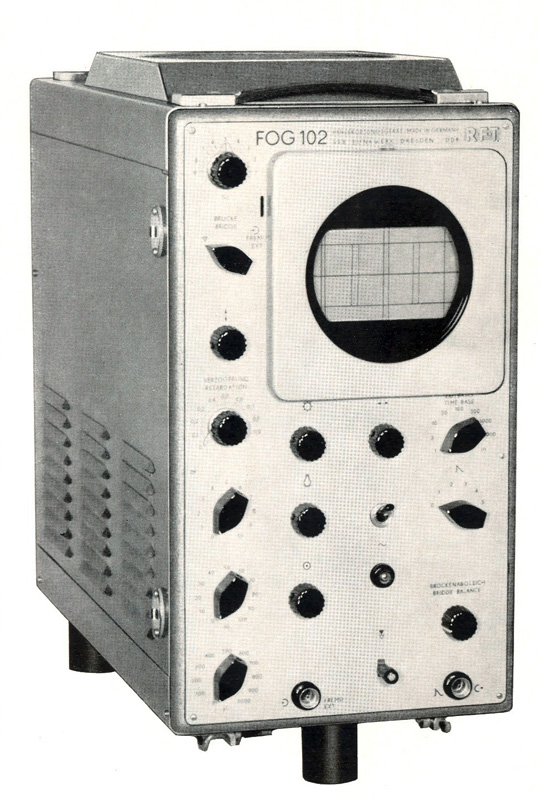 Das Fehlerortungsgerät FOG 102 der Firma Funkwerk Dresden